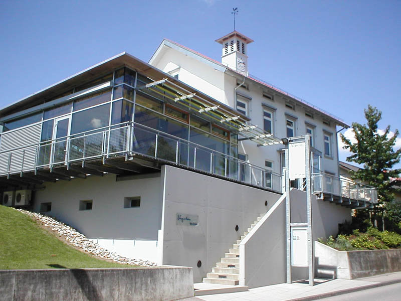 Altes Backhaus (rechts) und frühere Milchsammelstelle (links) in Abstatt-Happenbach